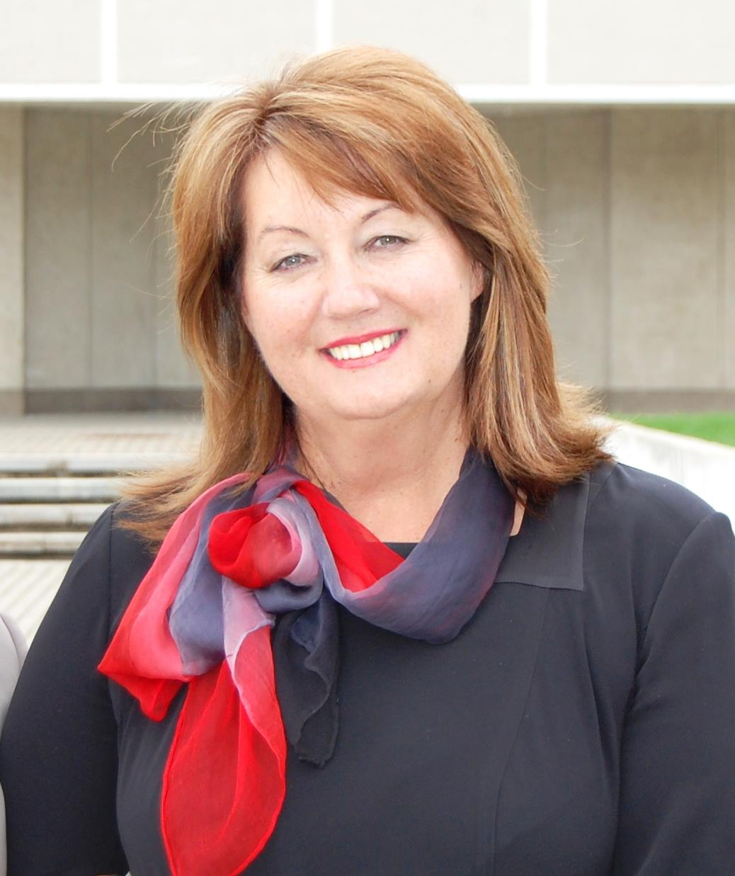 Lietuvos socialdemokratų partijos suvažiavime